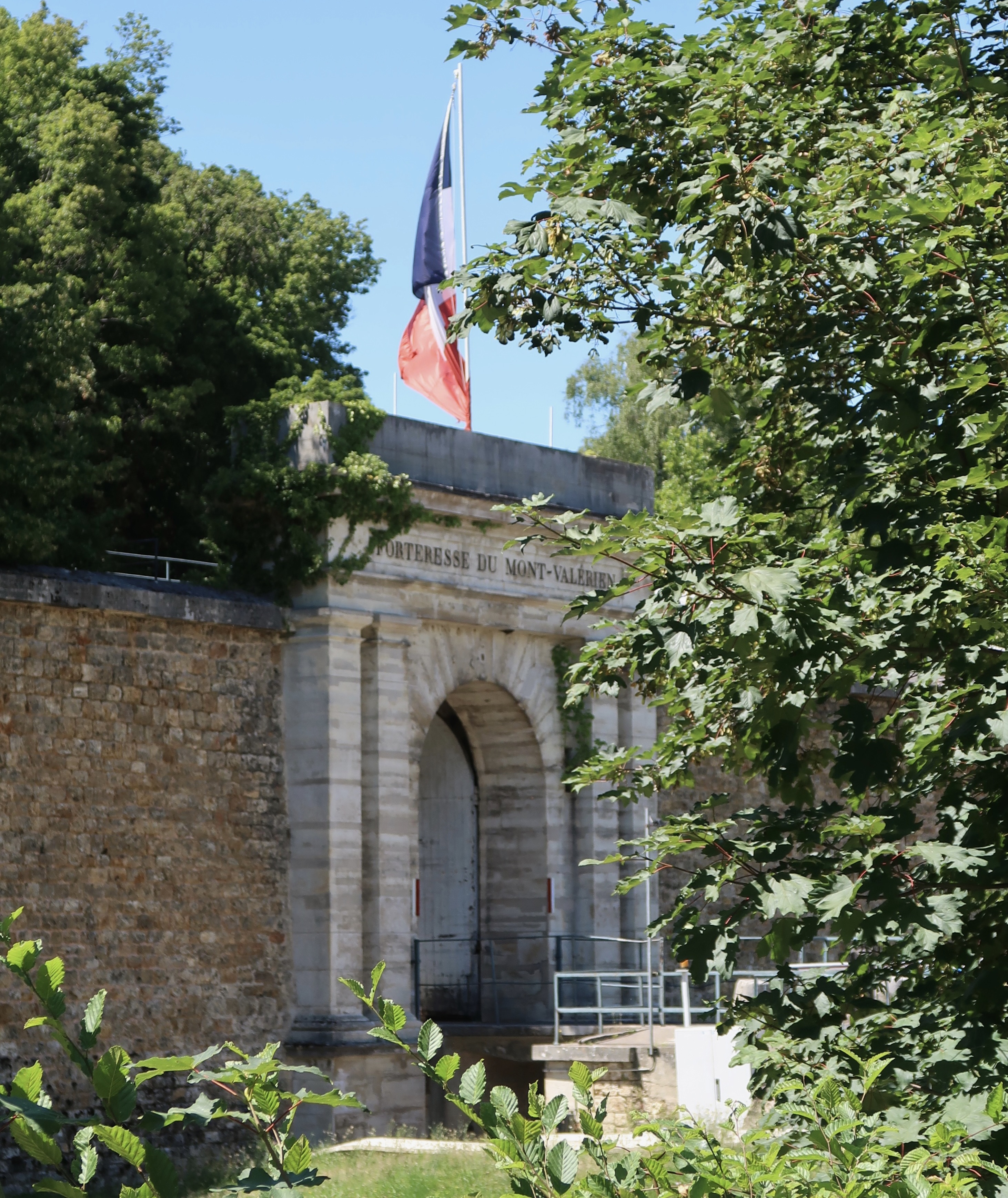 Entrée de la forteresse du Mont-Valérien à Suresnes (Hauts-de-Seine).